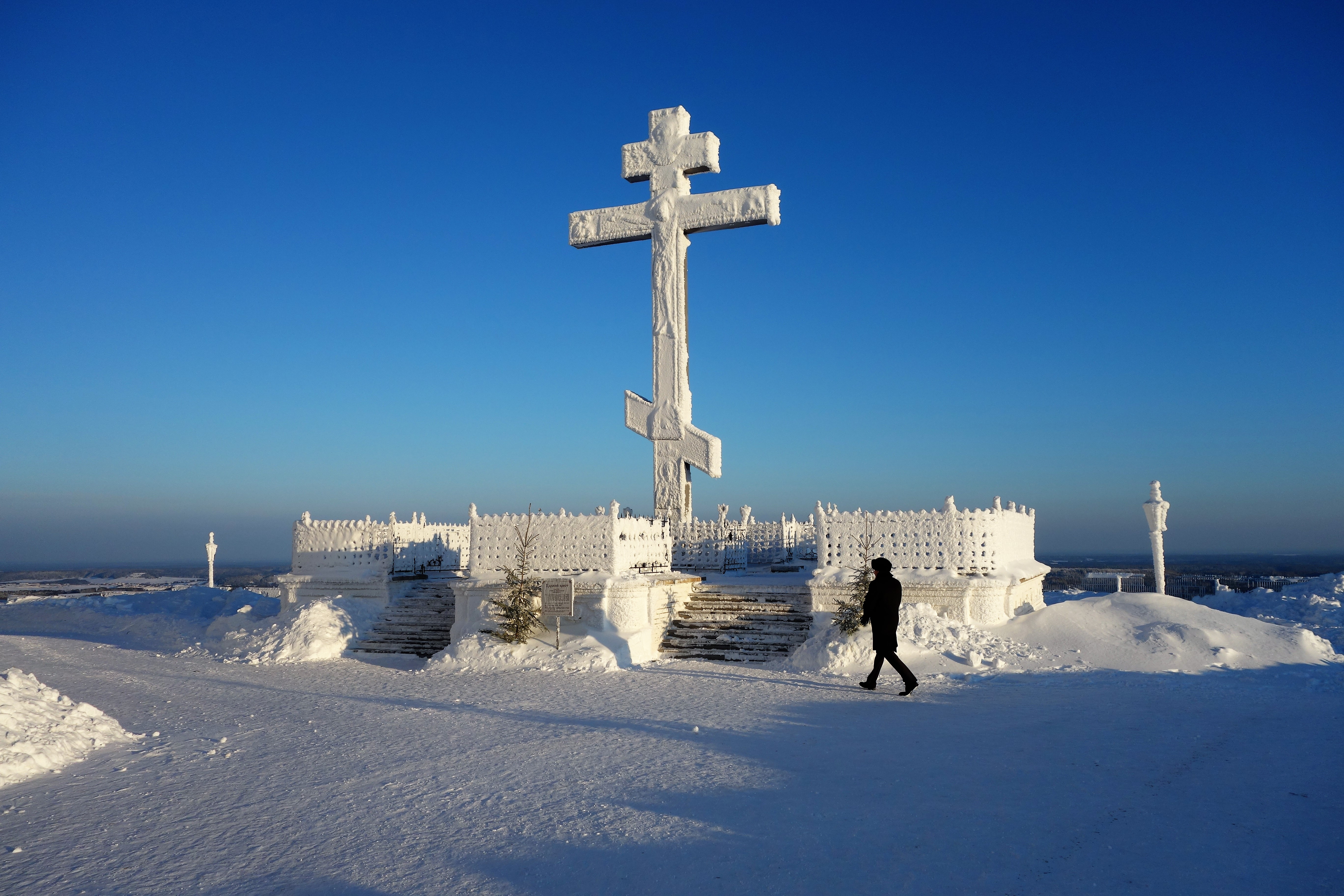 Russland im Schnee, orthodoxes Kreuz vor einer Kirche im Ural